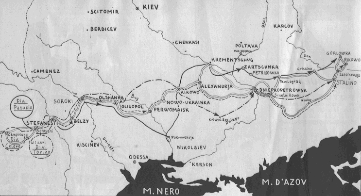 Mappa dell'avanzata dello CSIR durante la campagna di Russia